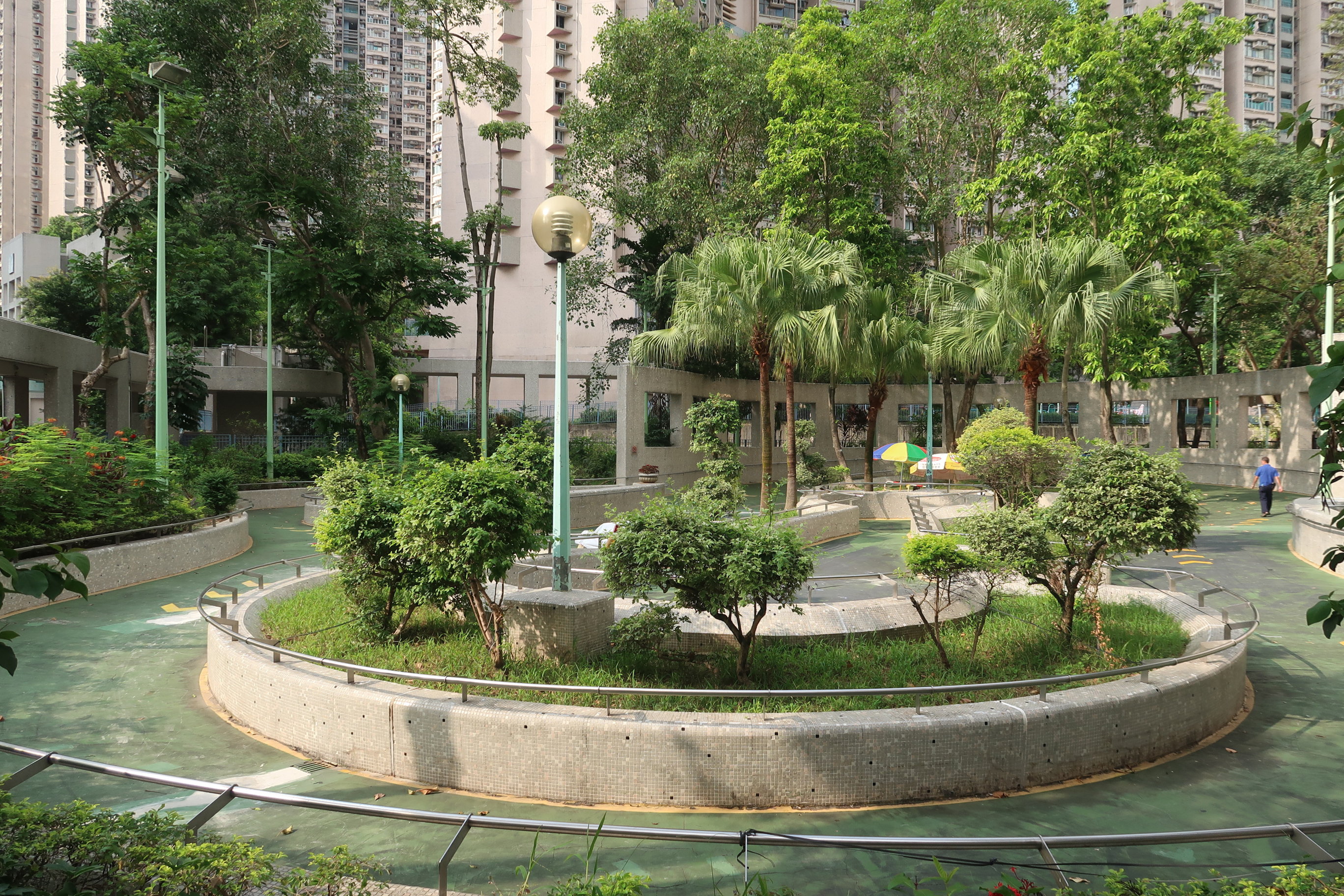 Fung Tak Estate Roller Skating Rink